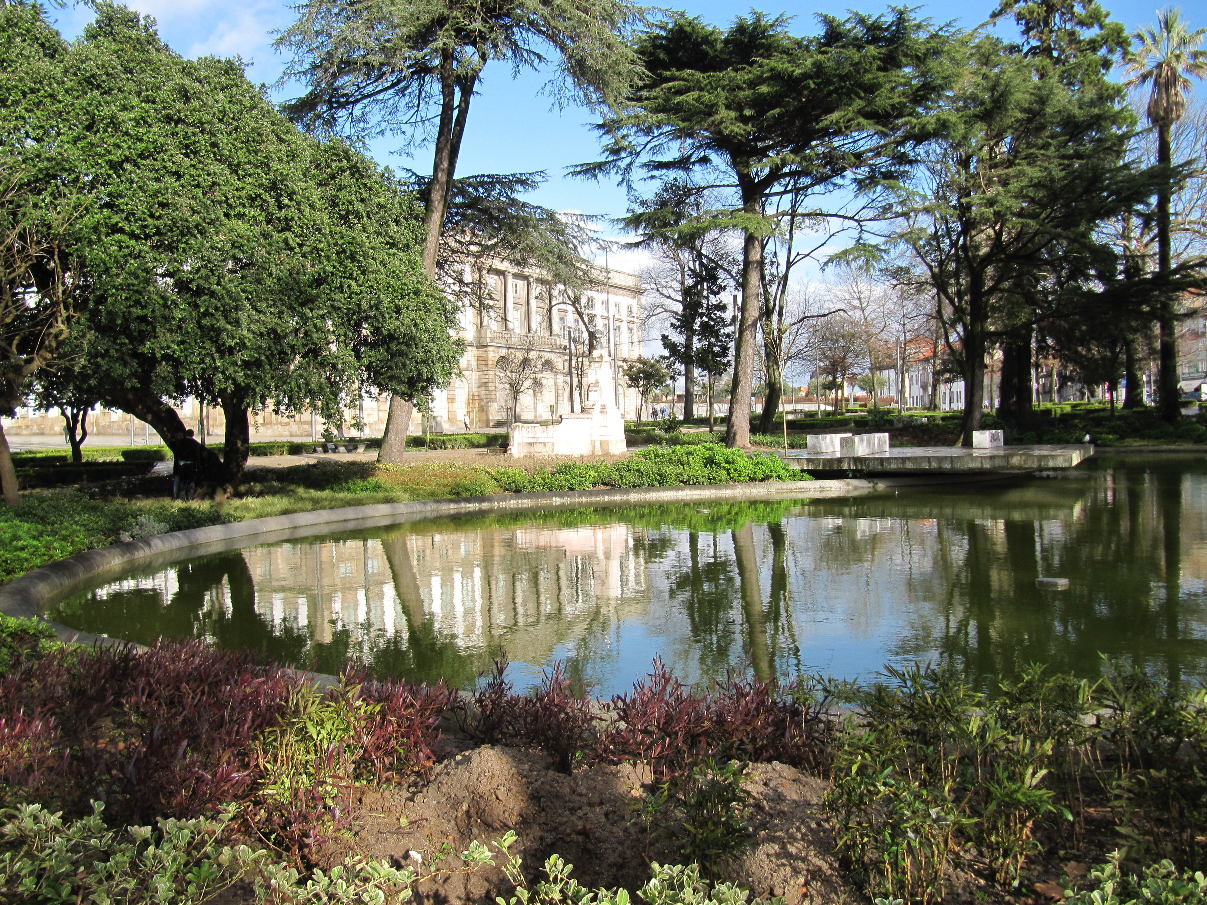 Jardim da Cordoaria